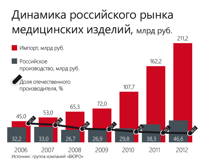 Динамика российского рынка медицинских изделий, млрд. руб. (2006-2012)